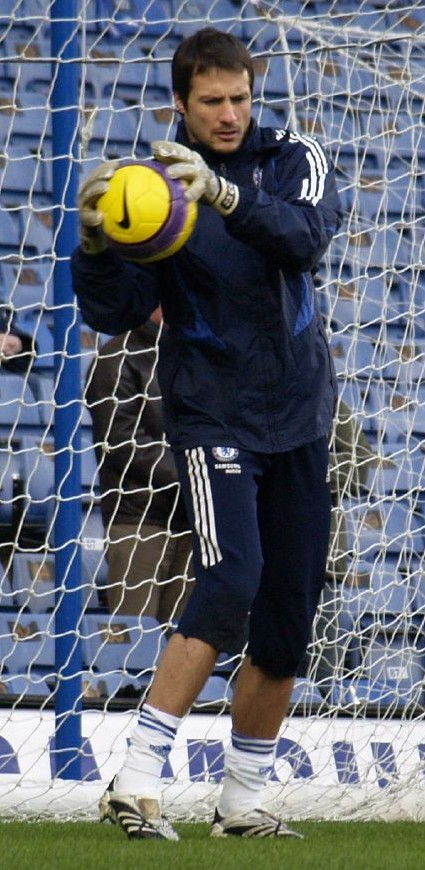 Carlo Cudicini